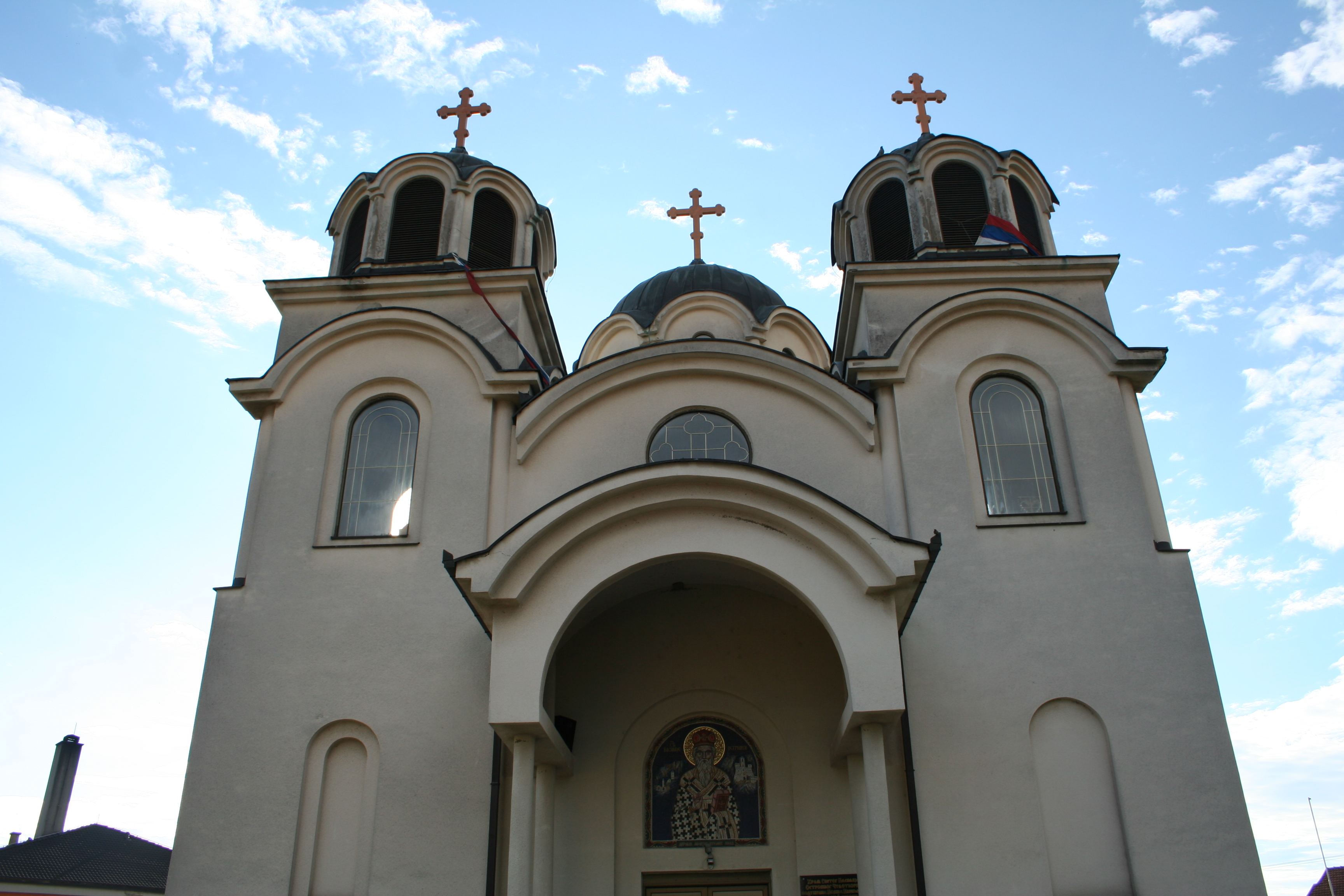 Crkva Svetog Vasilija Ostroškog u Kasarskim livadama